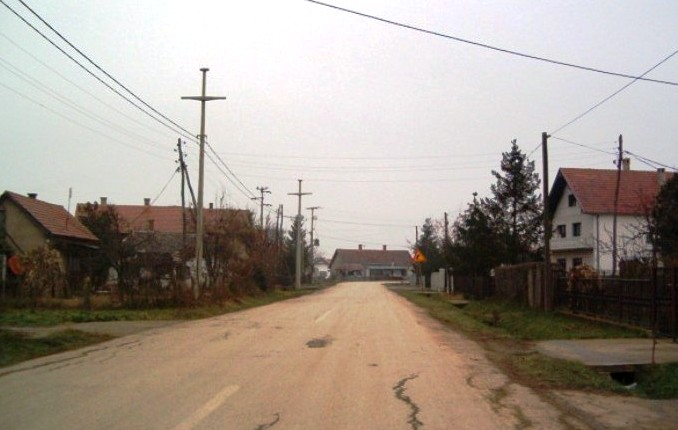 Гуњевац.